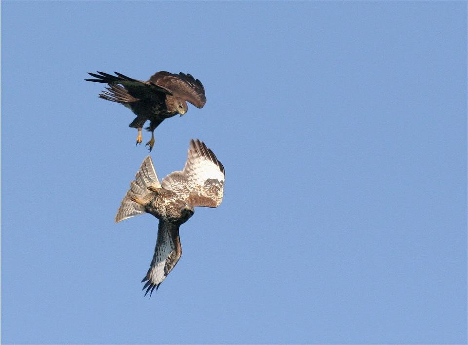 junge Mäusebussarde (Buteo buteo) bei spielerischer Verfolgungsjagd, Deutschland